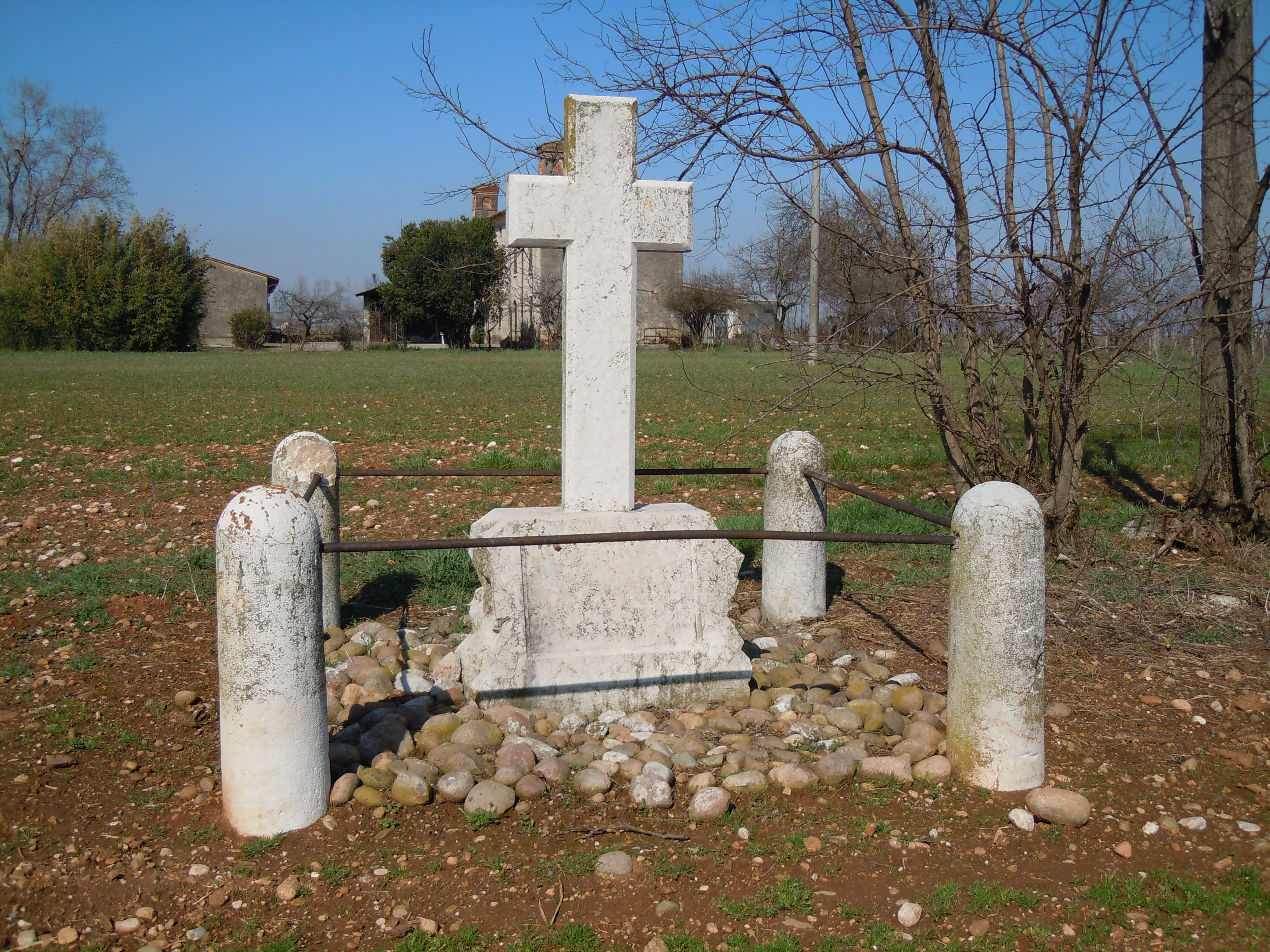 Rebecco, cippo in memoria del Principe austriaco Windisch Gratz.